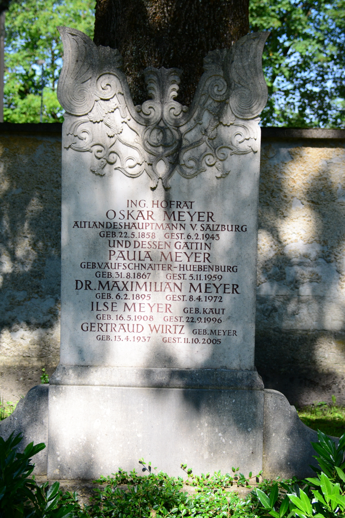 Grabstein von Ex-Landeshauptmann Oskar Meyer auf dem Kommunalfriedhof von Salzburg